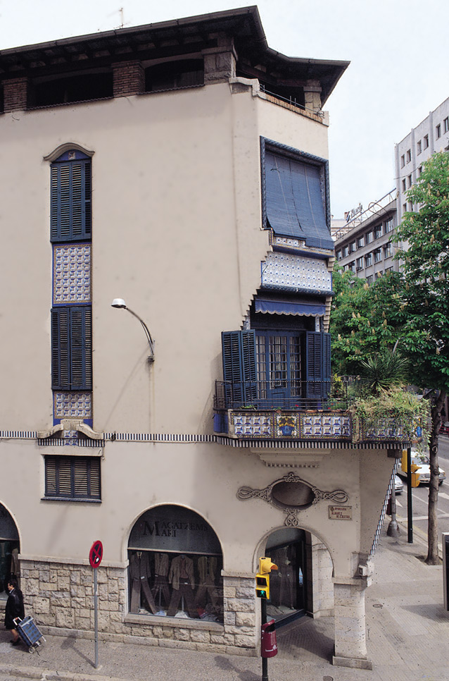 Casa de planta baixa